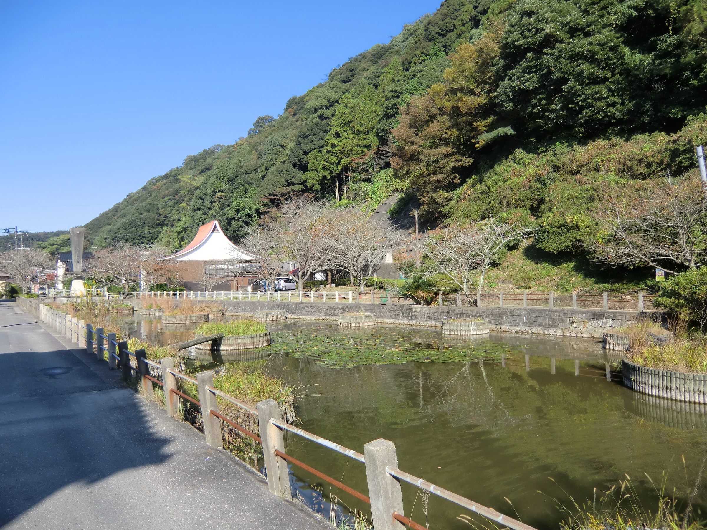 七尾城跡（益田市）の水堀跡。現在は七尾公園の花菖蒲園。